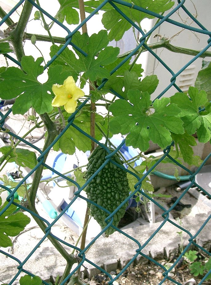 Momordica charantia